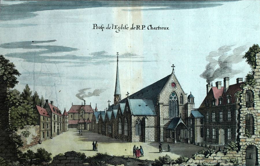 Chartreuse de Paris, gravure de Gaspard Merian (Topographia Galliae), 1661. Francfort.